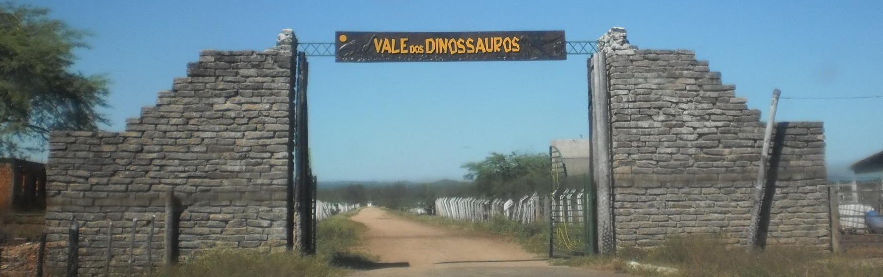 O Vale dos Dinossauros, em Sousa-PB, Brasil